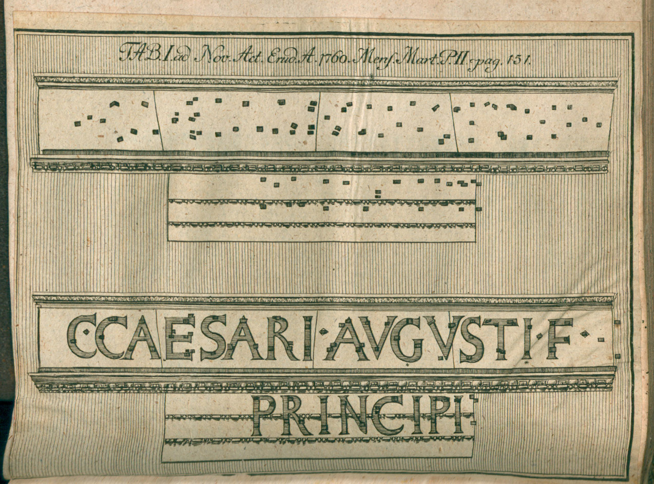 Illustration